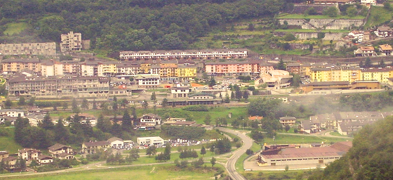 Panorama di Longarone